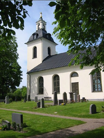 Rinna kyrka